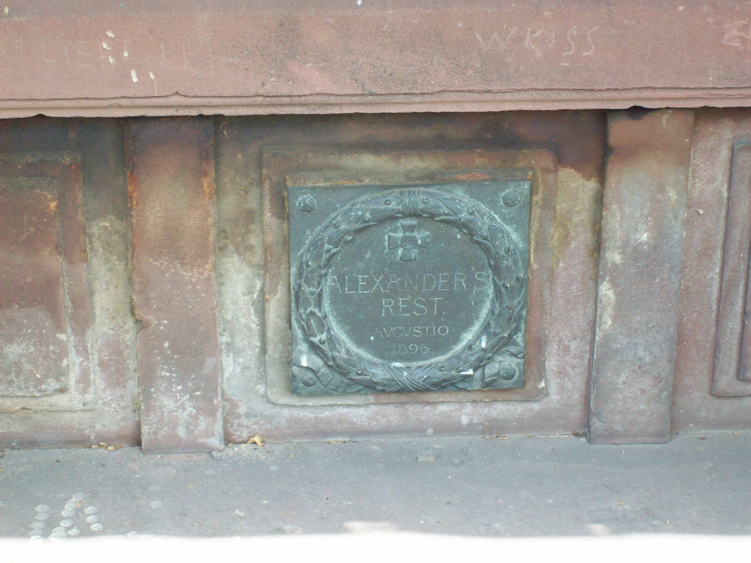 Detail der Tafel an Alexander’s Rest